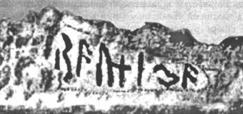 руны из Эвре Стабю. Алфавит Дирингера